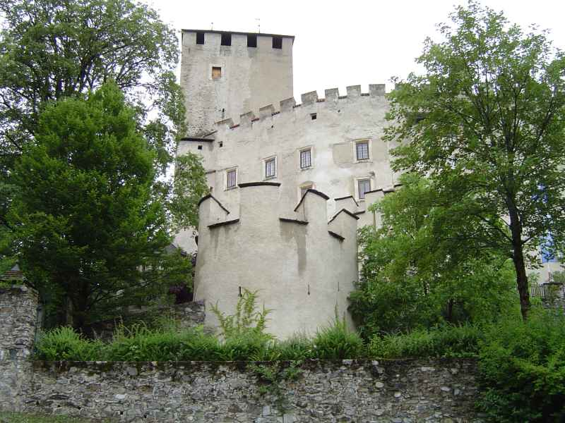 Schloss Bruck (Lienz, Osttirol)